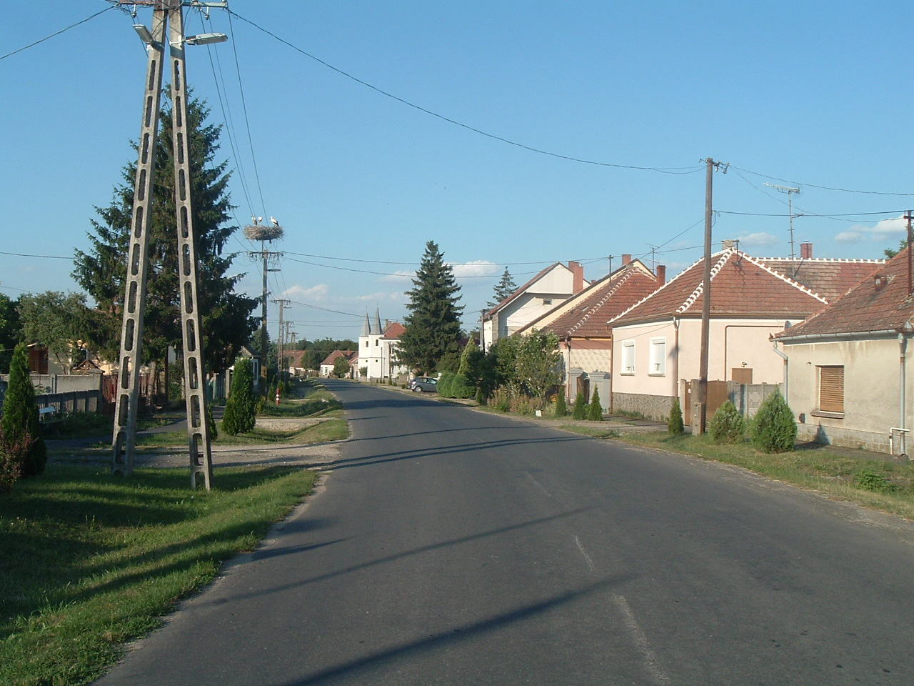 Tompaládony, Hungary